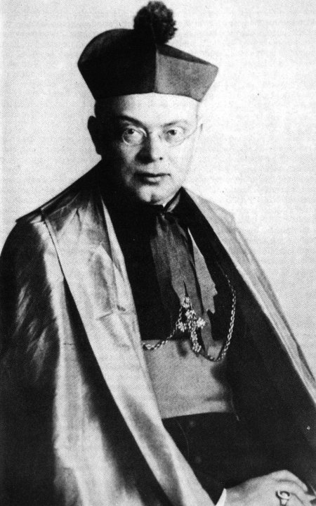 Graf Eduard O'Rourke, Bischof von Riga, später von Danzig (geboren in Minsk)